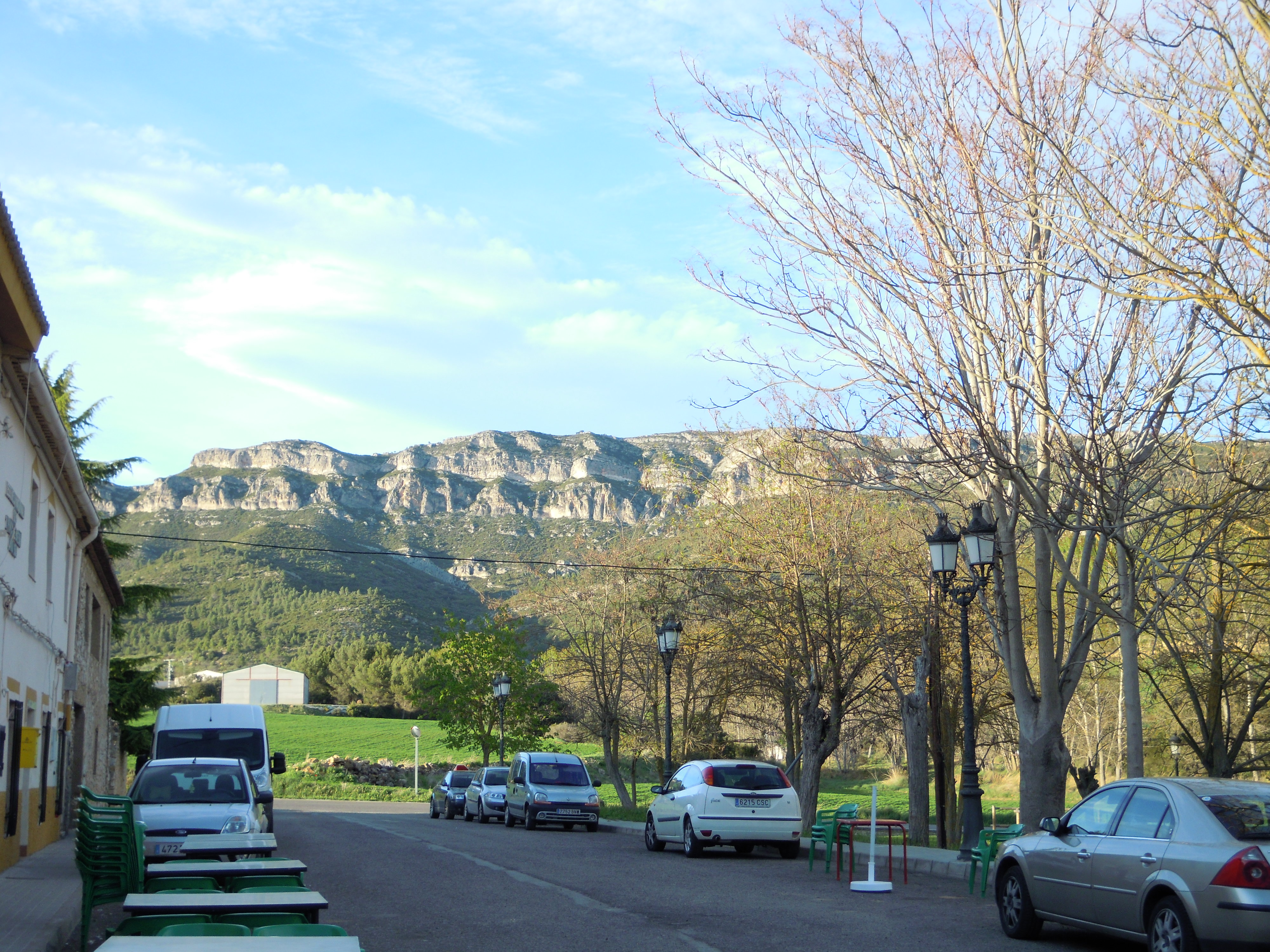 Sierra Martes (Cortes de Pallás, España)